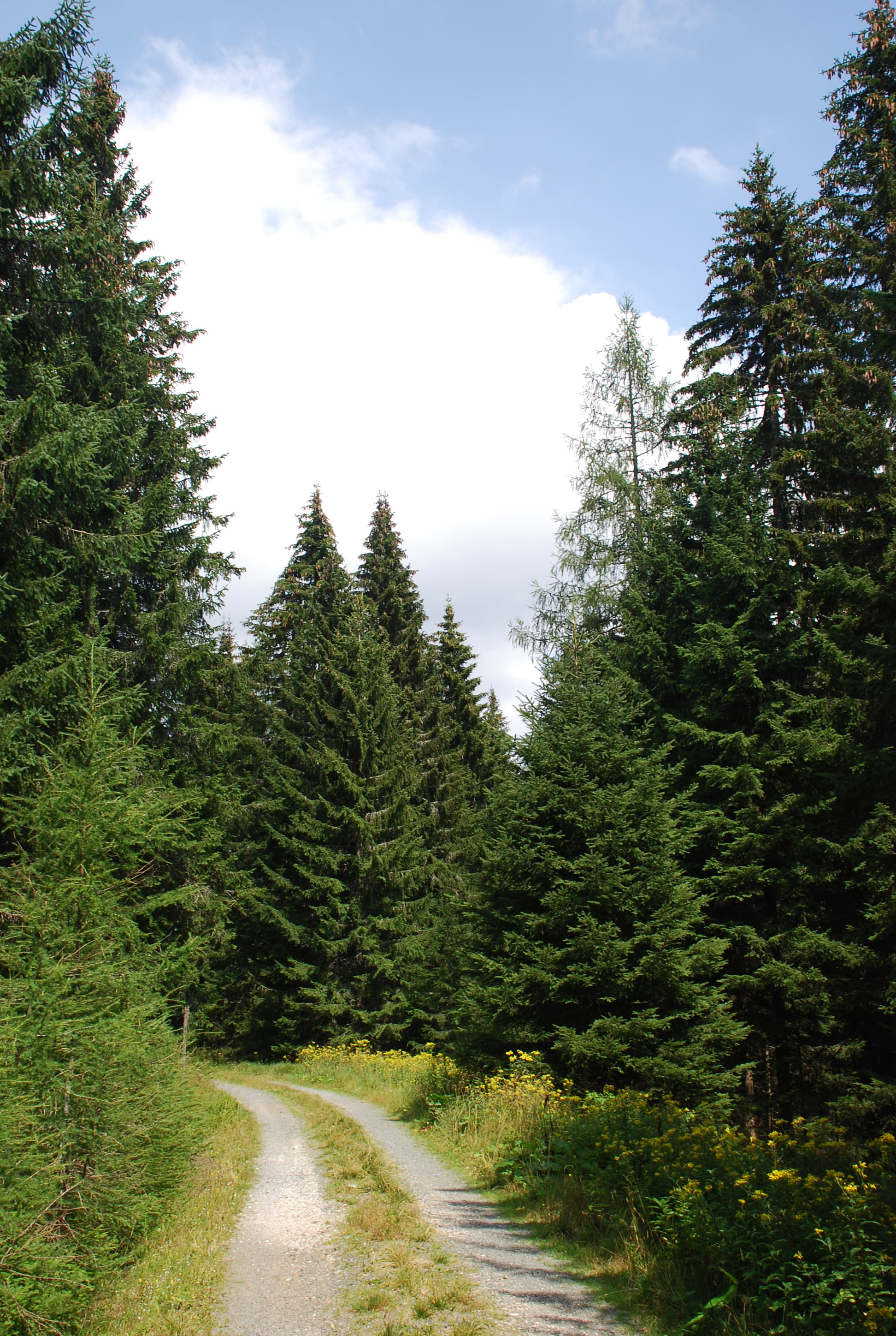 Hebalm - vom Forsthaus nach Süden, die alte Weinstraße an der Grenze von Steiermark und Kärnten / Österreich, mit Picea abies und Larix decidua.